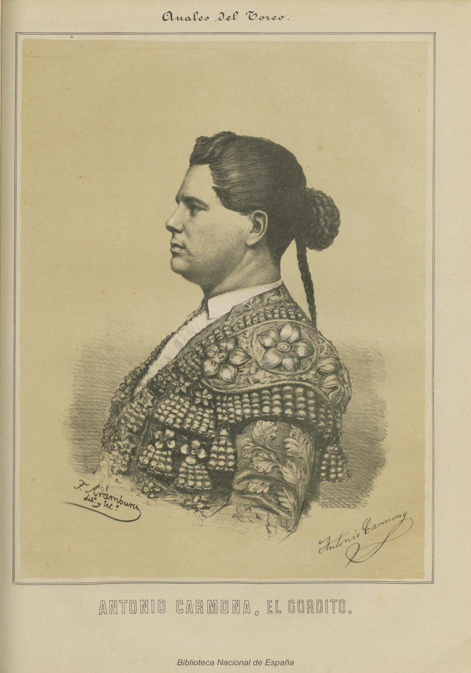 Antonio Carmona, el Gordito, litografía de Arámburu. Ilustración de Anales del toreo: reseña histórica de la lidia de reses bravas: galería biográfica de los principales lidiadores: razón de las primeras ganaderías españolas, sus condiciones y divisas obra escrita por José Velázquez y Sánchez; e ilustrada por reputados artistas, Madrid, 1888.